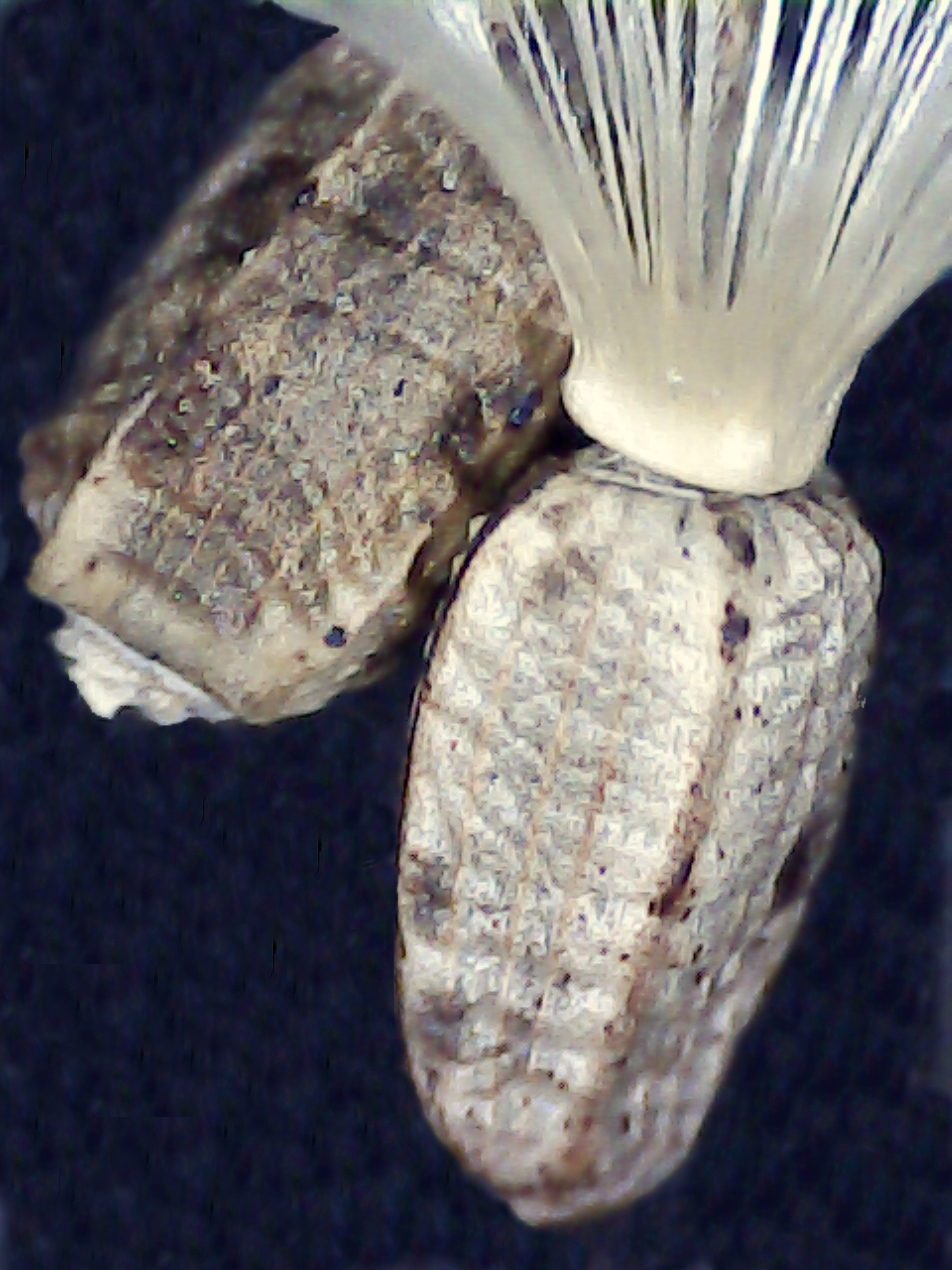 Onopordum nervosum (Cardo gigante) - Cipselas sueltas - x20 - Carretera nacional N301, km209,250, Paraje el Carril de la Longaniza, circa La Roda (Albacete, España).